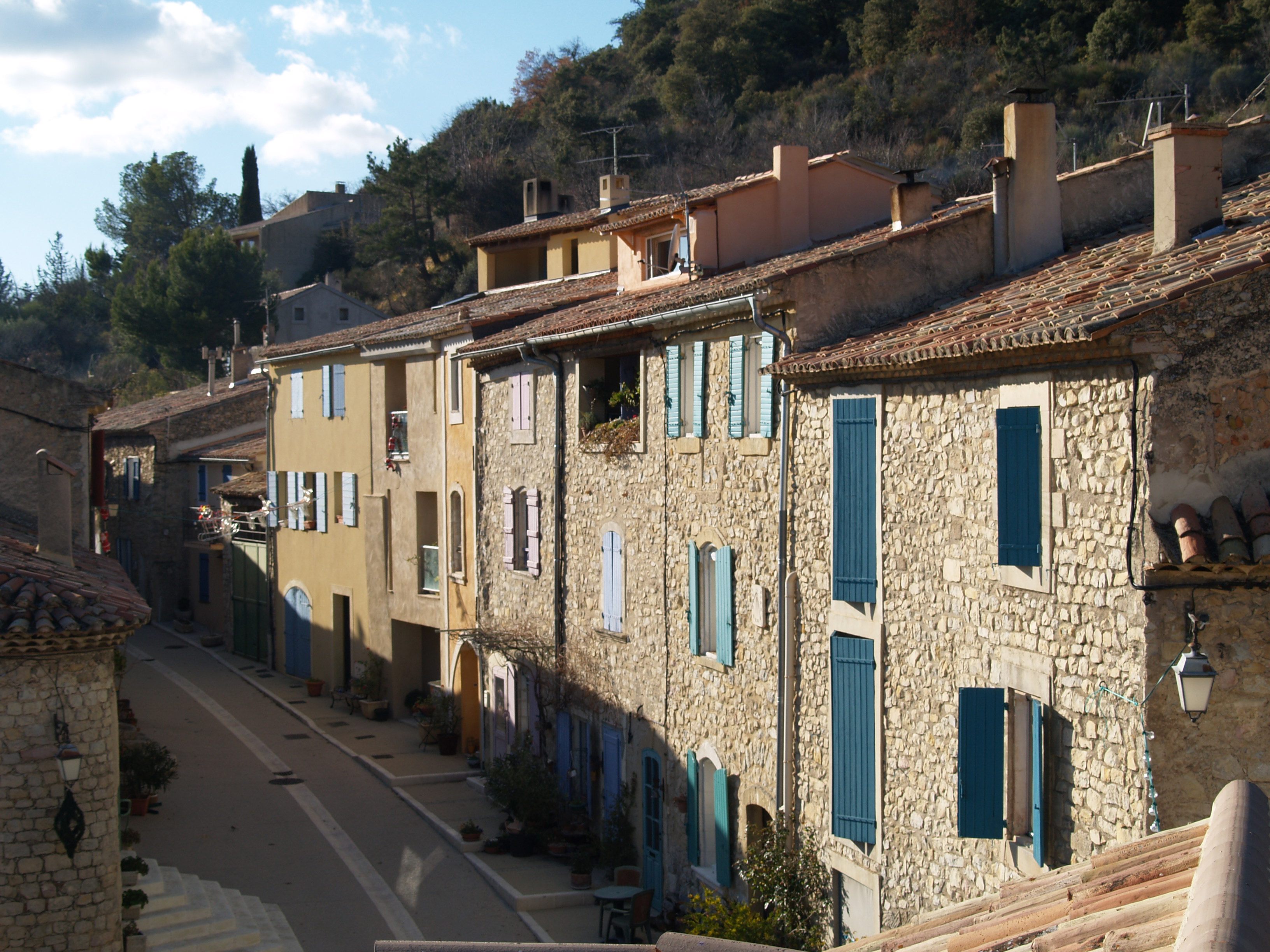 Rue de Vitrolles en Luberon